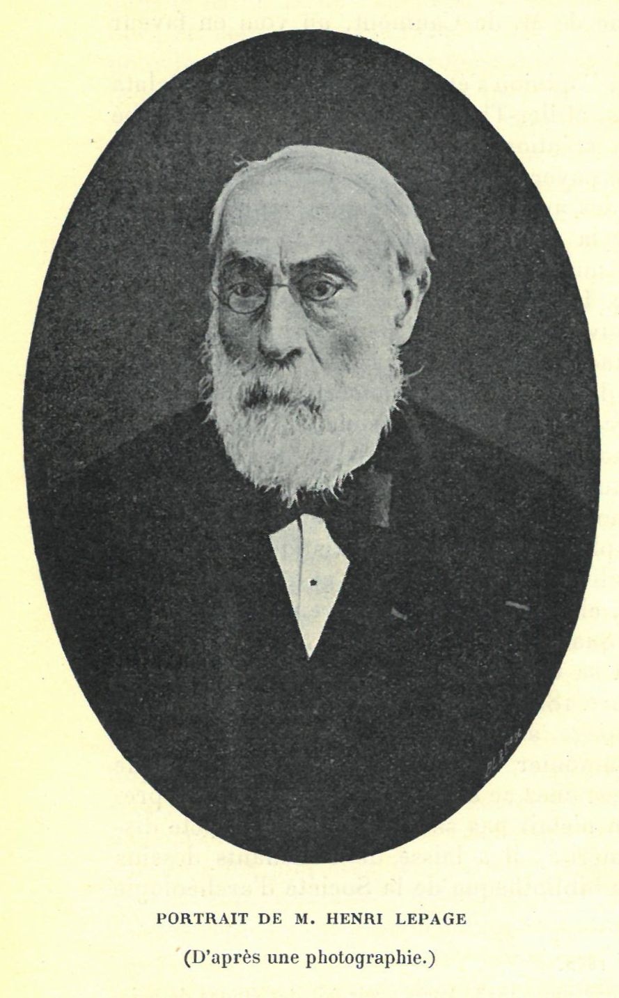 Portrait de l'historien lorrain Henri Lepage